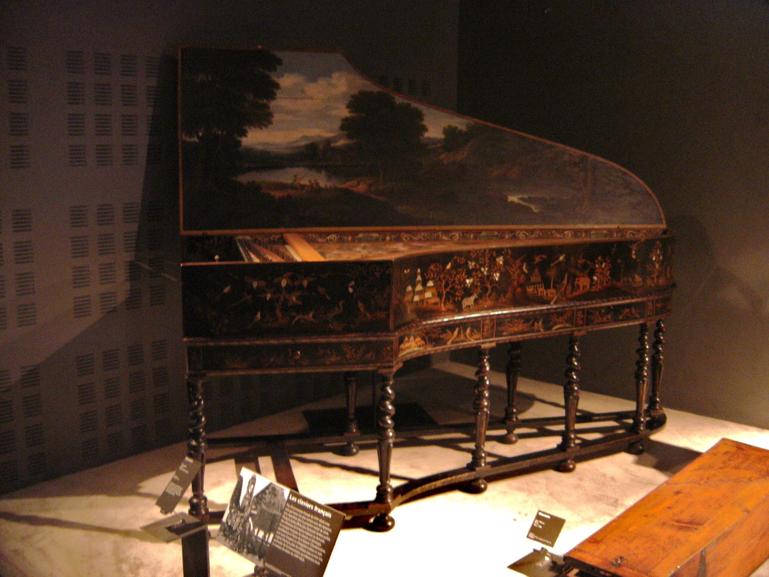 Clavecin anonyme (Lyon?, XVIIe siècle) - Paris, Musée de la Musique